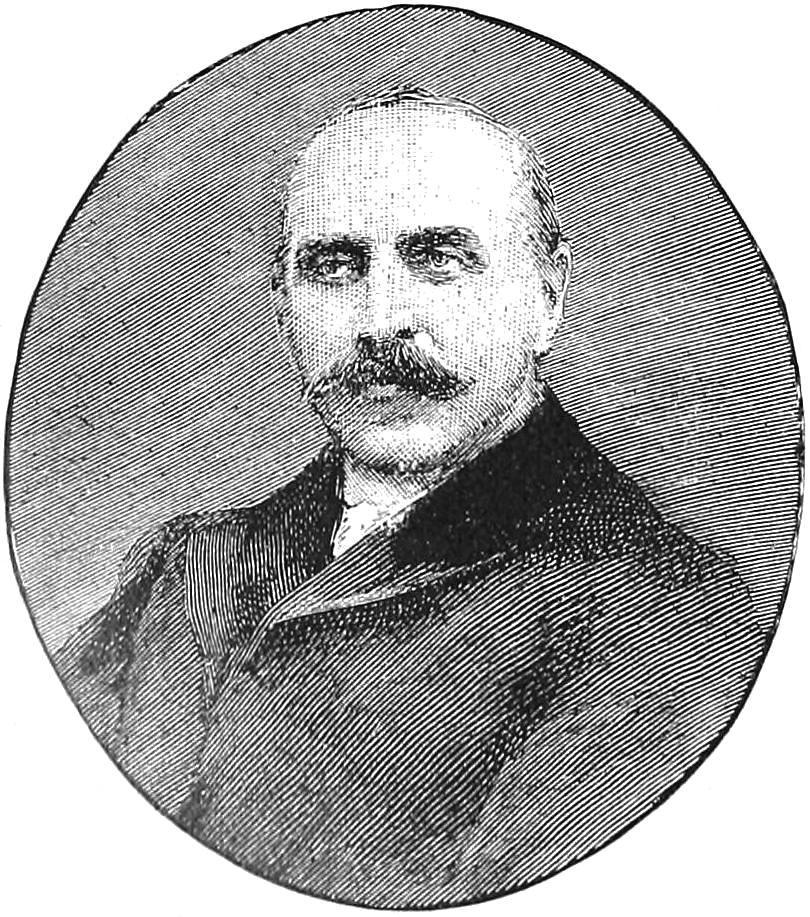 "Colonel Sandherr".